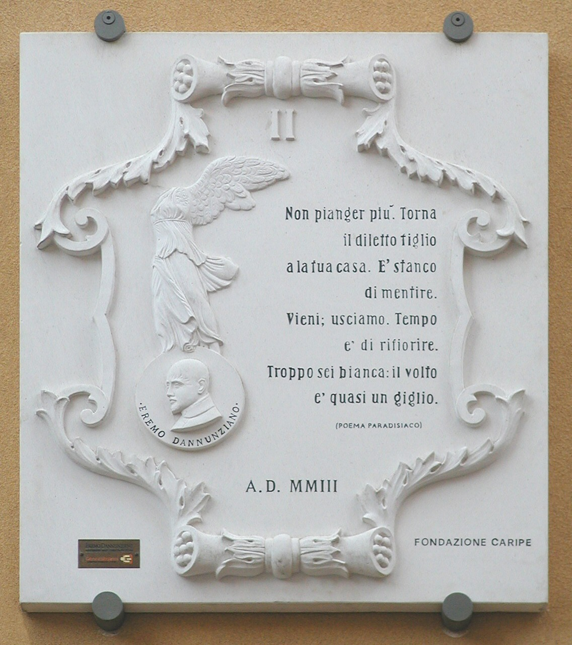 Am Geburtshaus in Pescara ein Gedicht an die Mutter